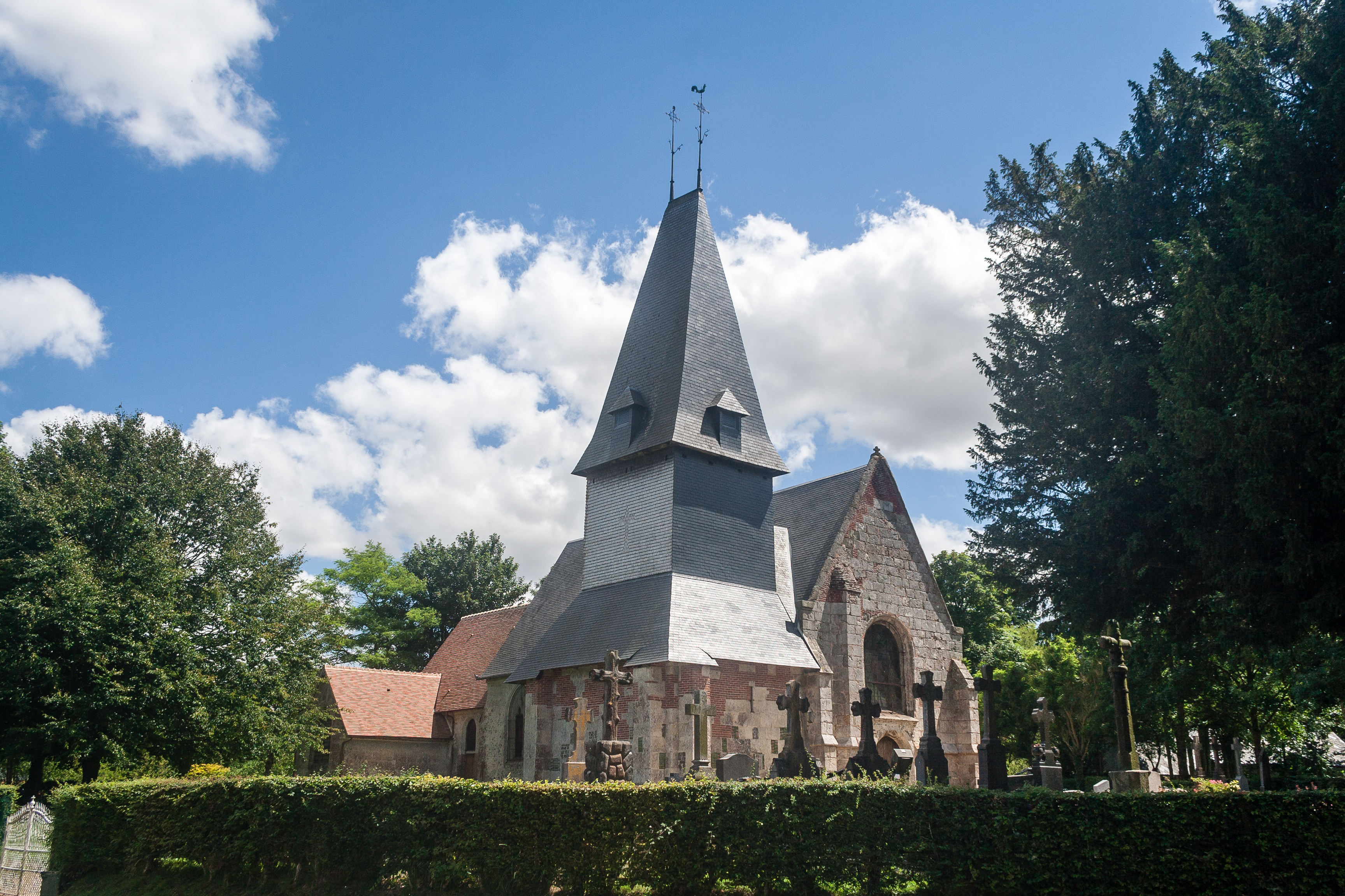 Extérieur de l'église Saint-Sébastien de Préaux-Saint-Sébastien (France).